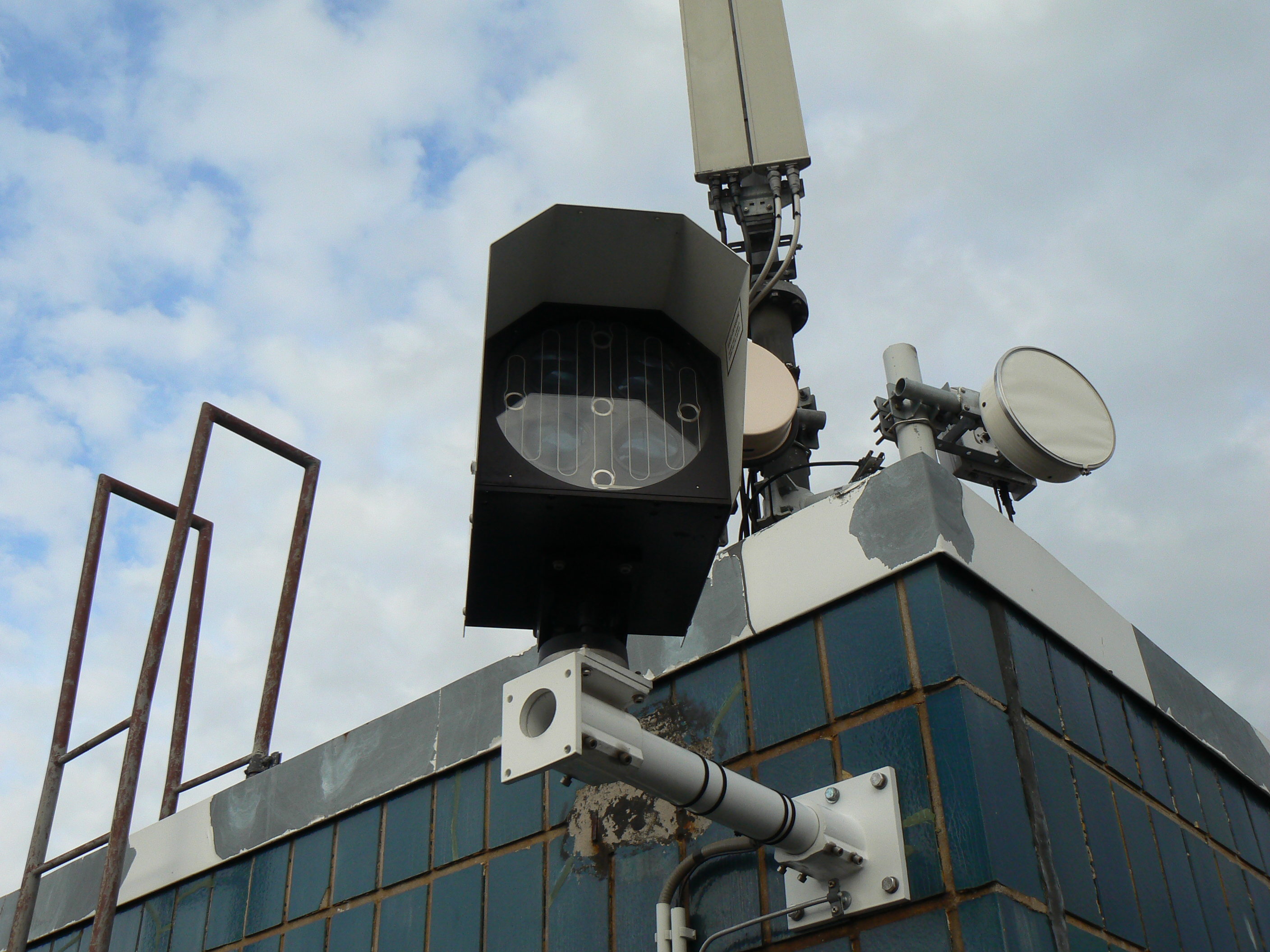 Laserlink der AG DSN Sektion Hochschulstrasse auf dem Dach der Hochschulstrasse 46